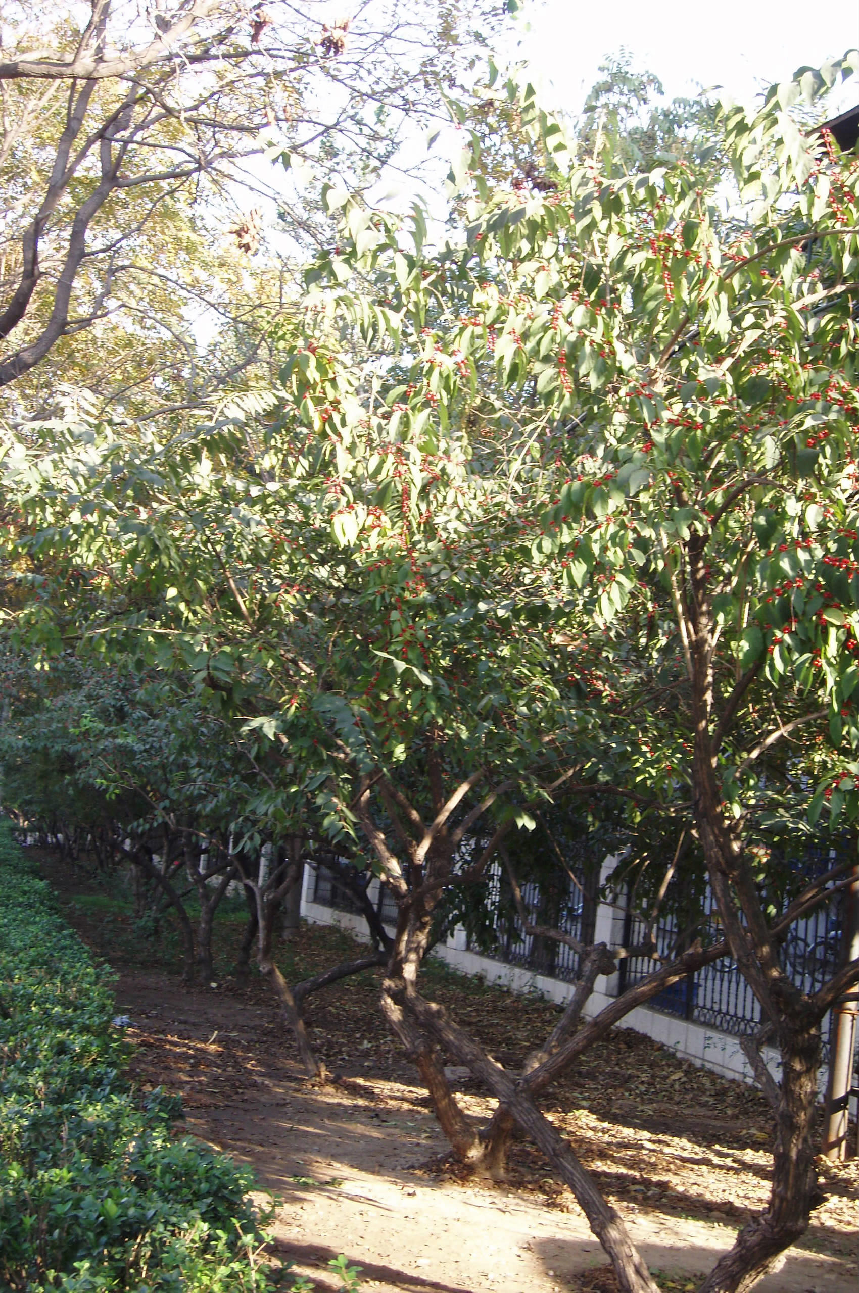 Amur maackii in autumn